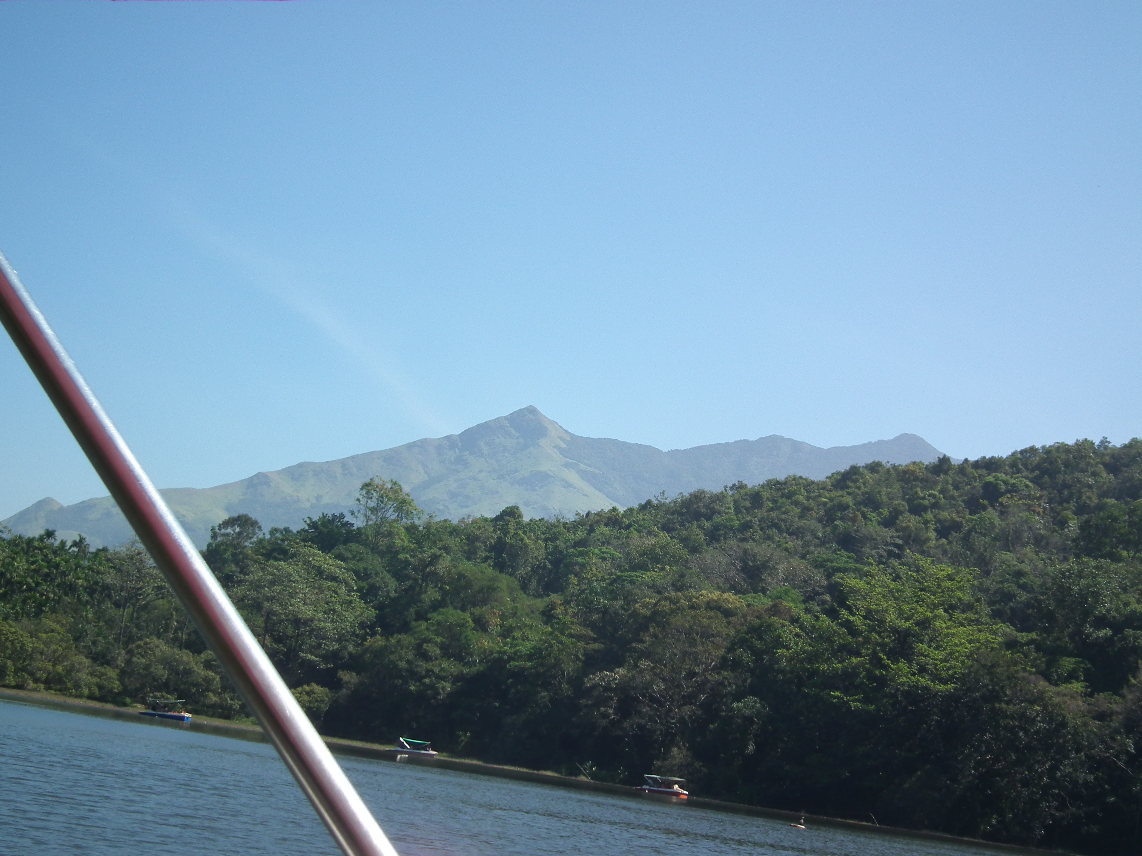 Snap from Pookode Lake